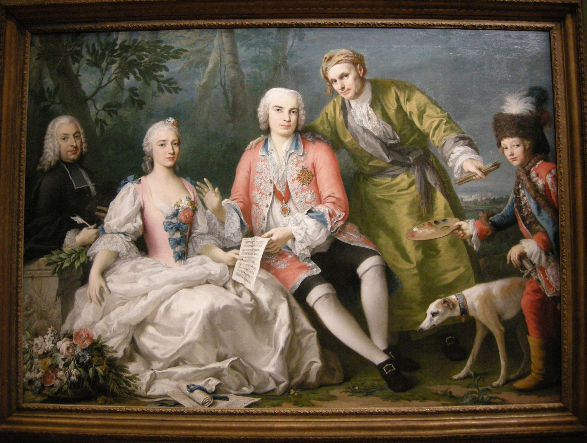 Metastasio, Teresa Castellini, Farinelli, Amigoni, Farinelli's dog, Farinelli's page boy; the score is "Vi conosco amate stelle" from Metastasio's Zenobia in a musical setting by Gaetano Latilla (1711–1788).